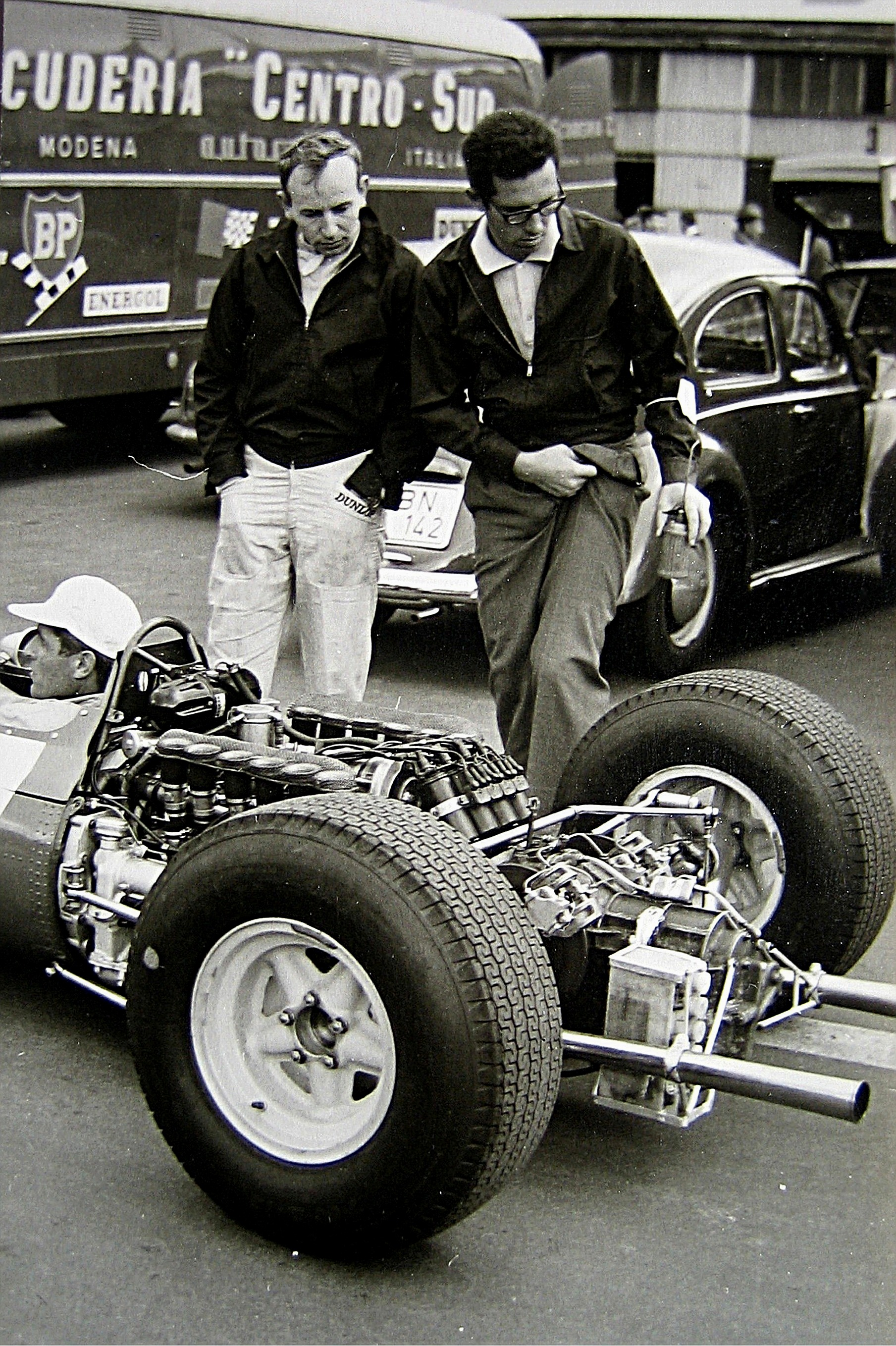 John Surtees (links stehend) und Renningenieur Mauro Forghieri